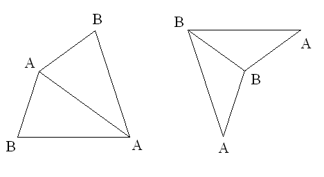 Cerf-volant et fléchette pour pavage de Penrose. Image personnelle.